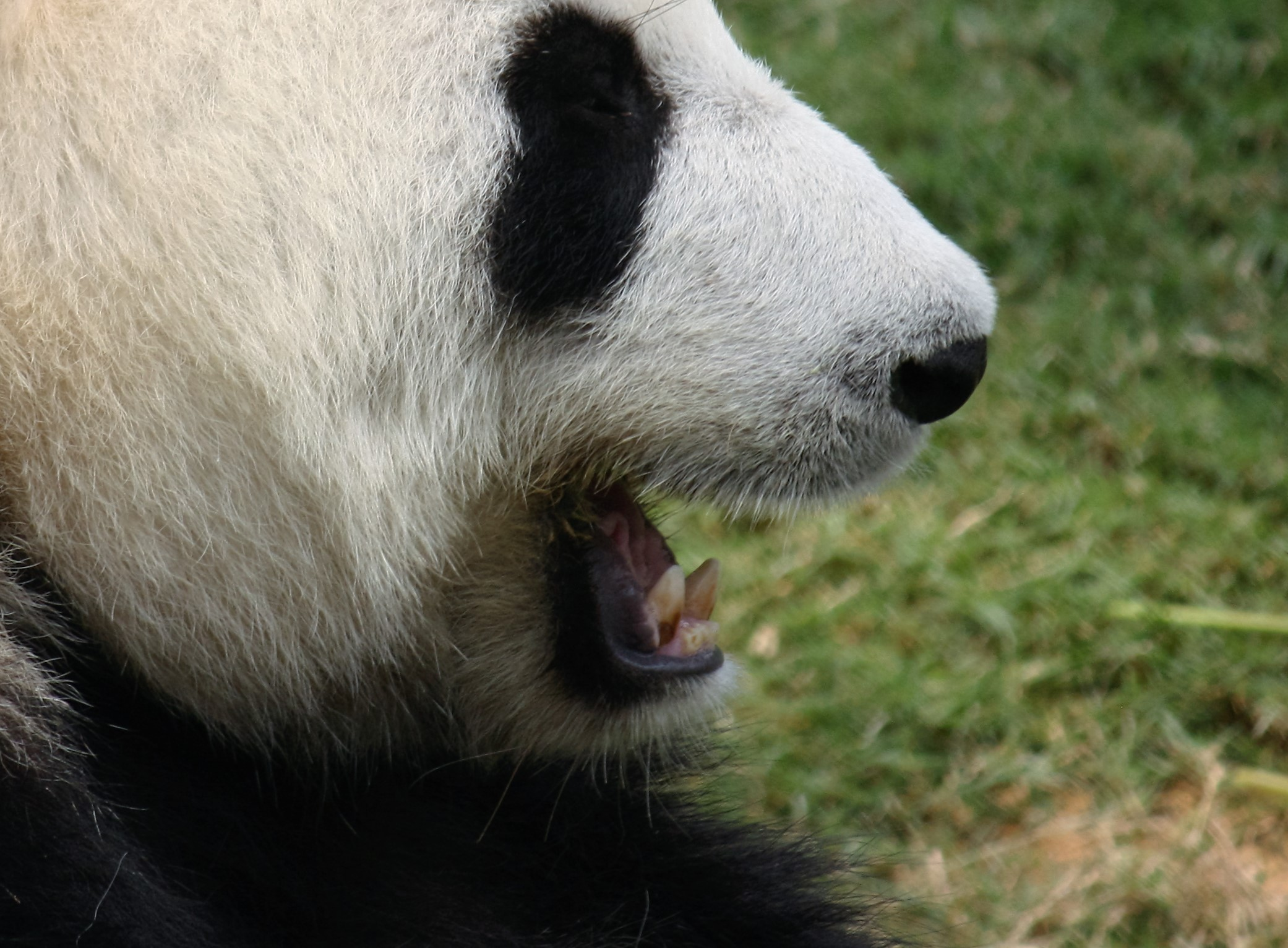 Großer Panda im Ocean Park, Hong Kong